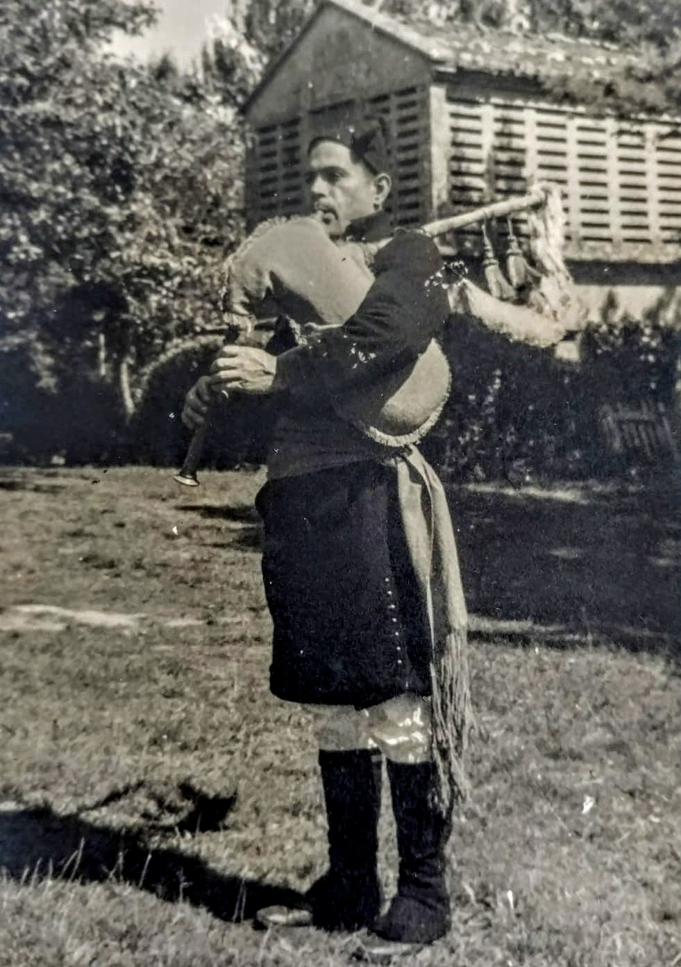 Farruco tocando a gaita.